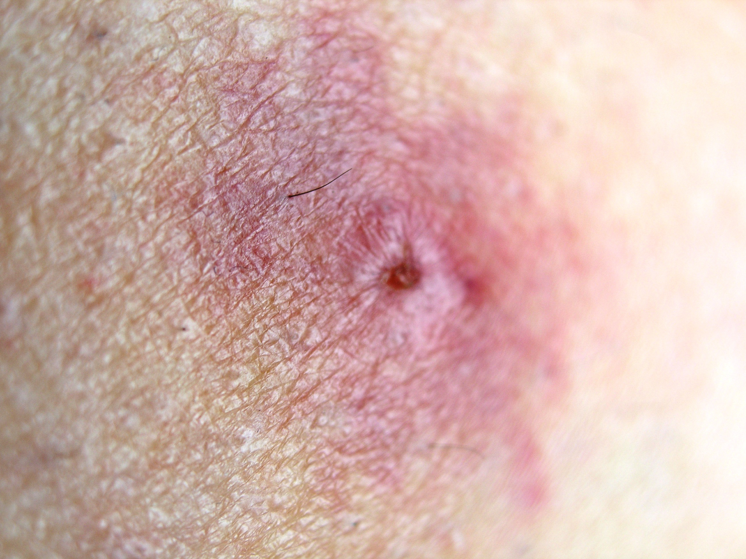 Gnitzenstich